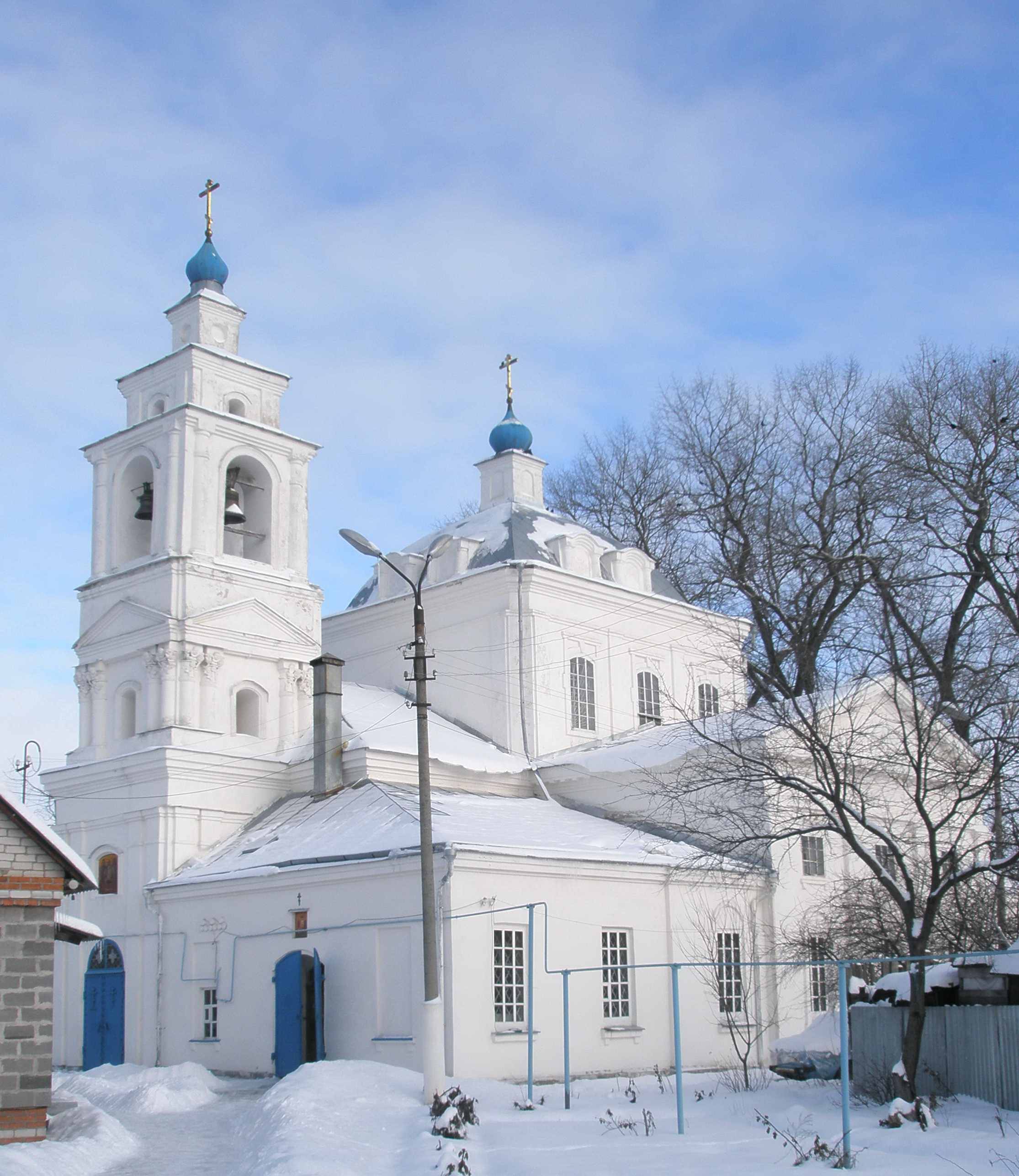 Успенская церковь Древлеправославных Христиан г. Курска